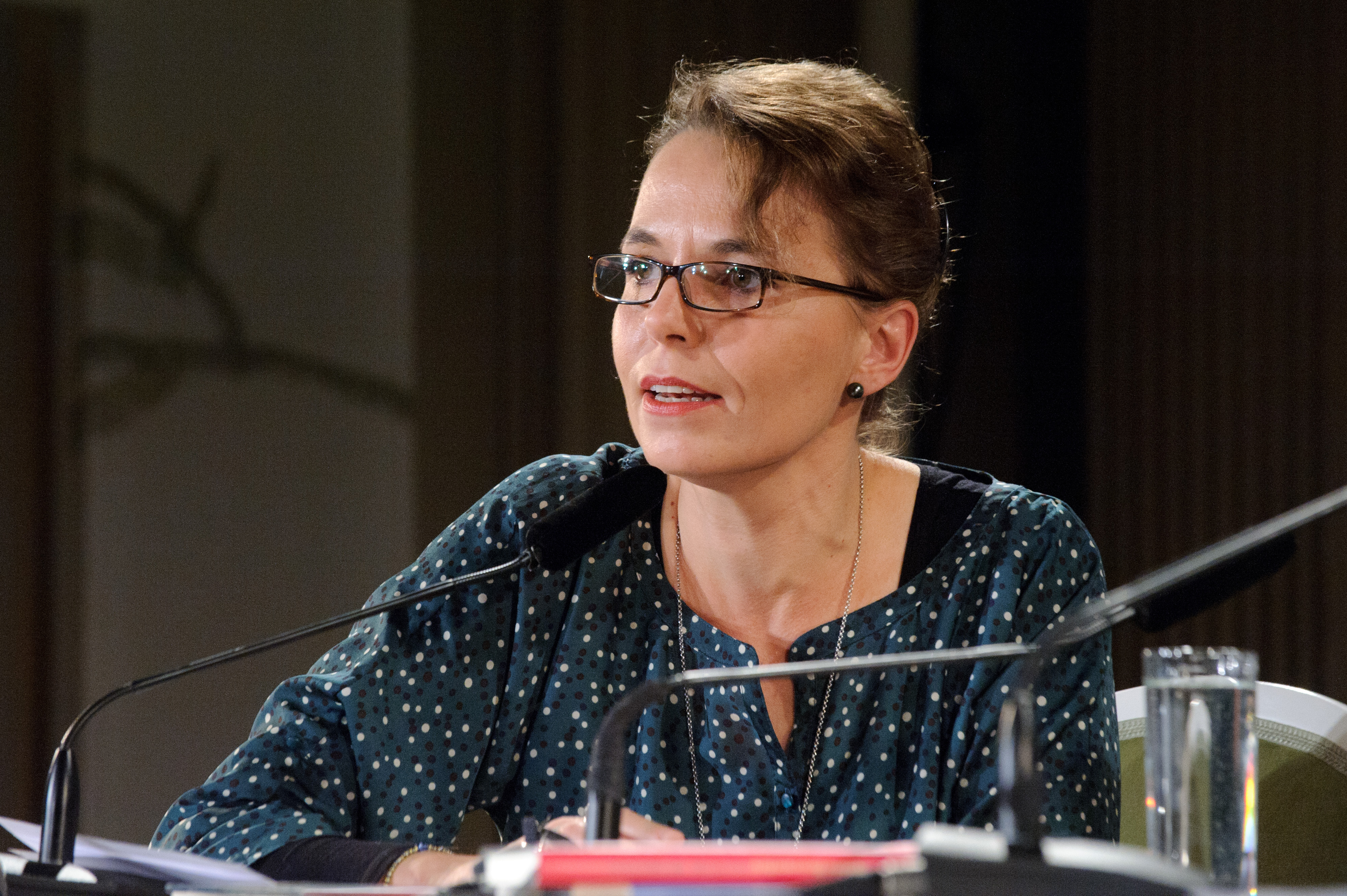 Veronika Peters (Schriftstellerin) Lesung: Wie geht es Georg Laub? - Silvia Bovenschen Foto: Stephan Röhl